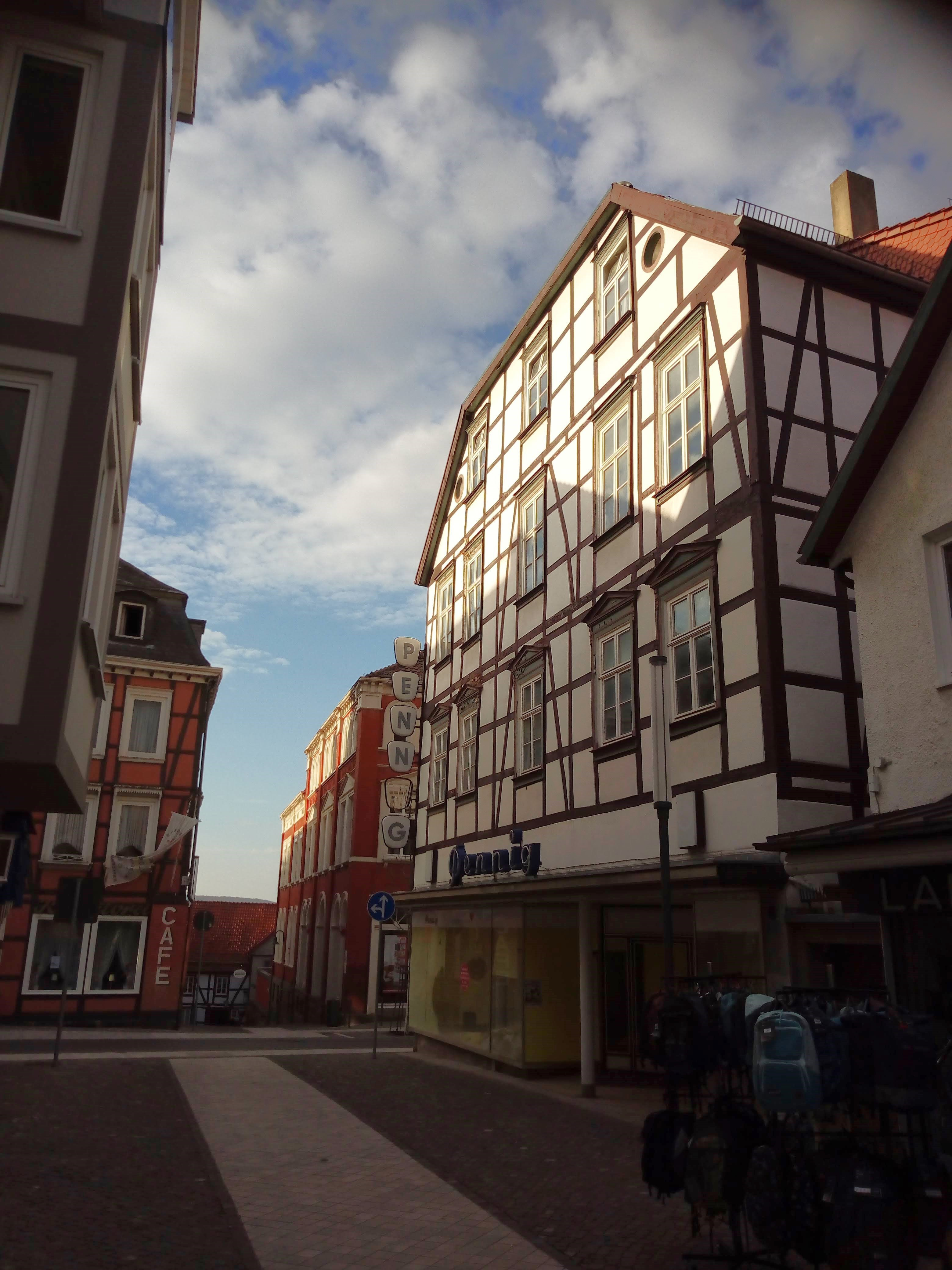 Markstraße 10, Warburg